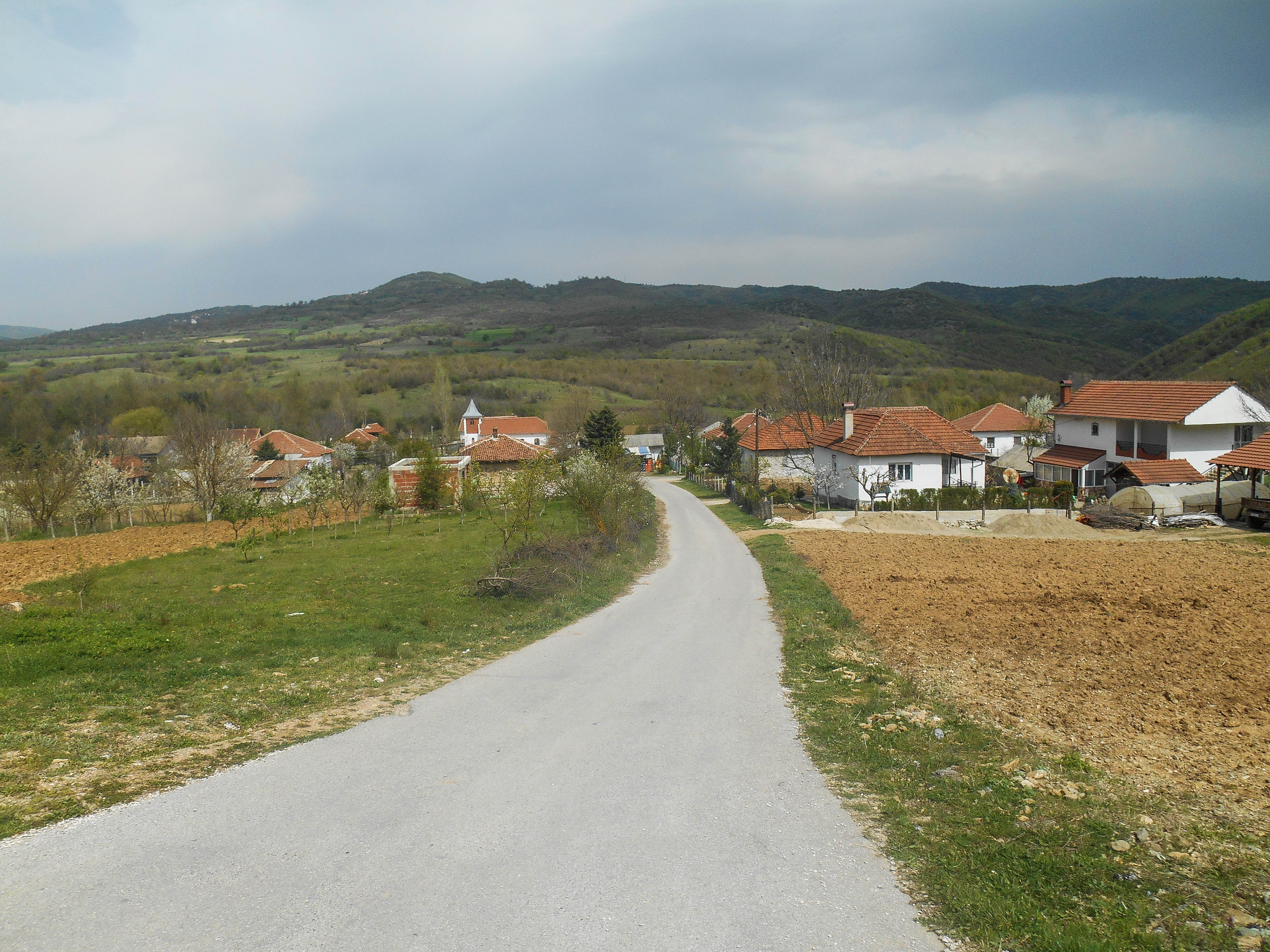 Раборци